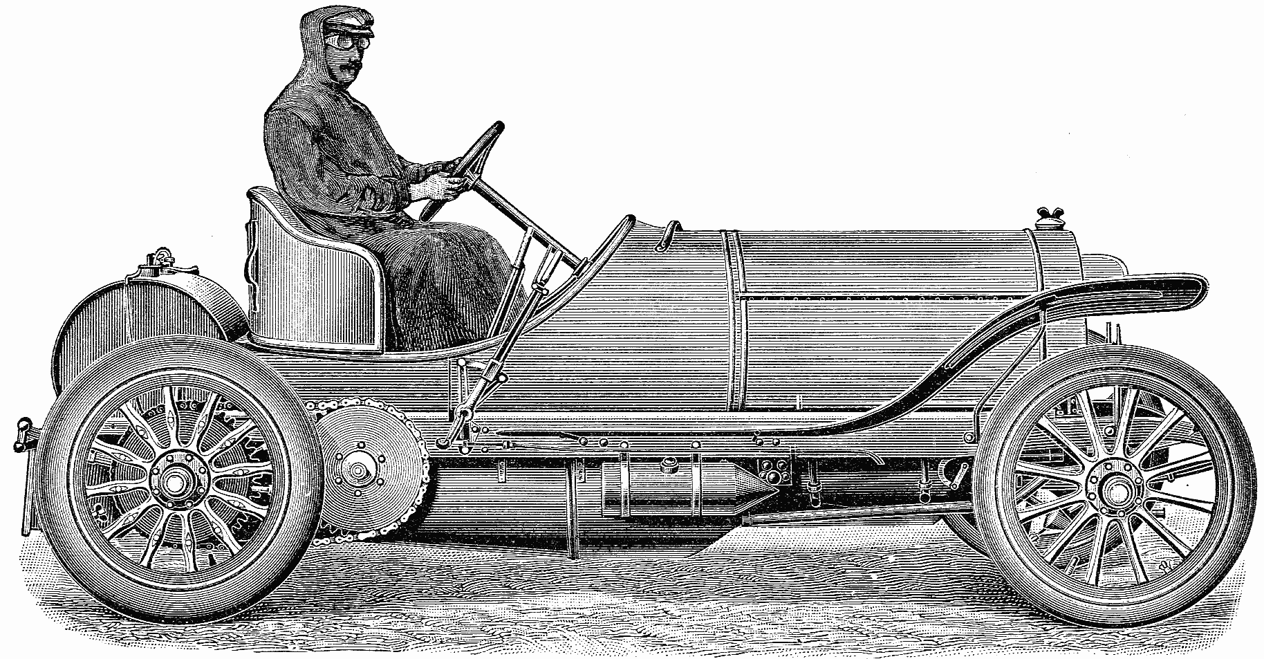 Original: Mercedes-Gordon-Bennet-Wagen mit 120 pferdigem Vierzylindermotor, der von Jenatzy beim Rennen 1905 in der Auvergne gefahren wurde